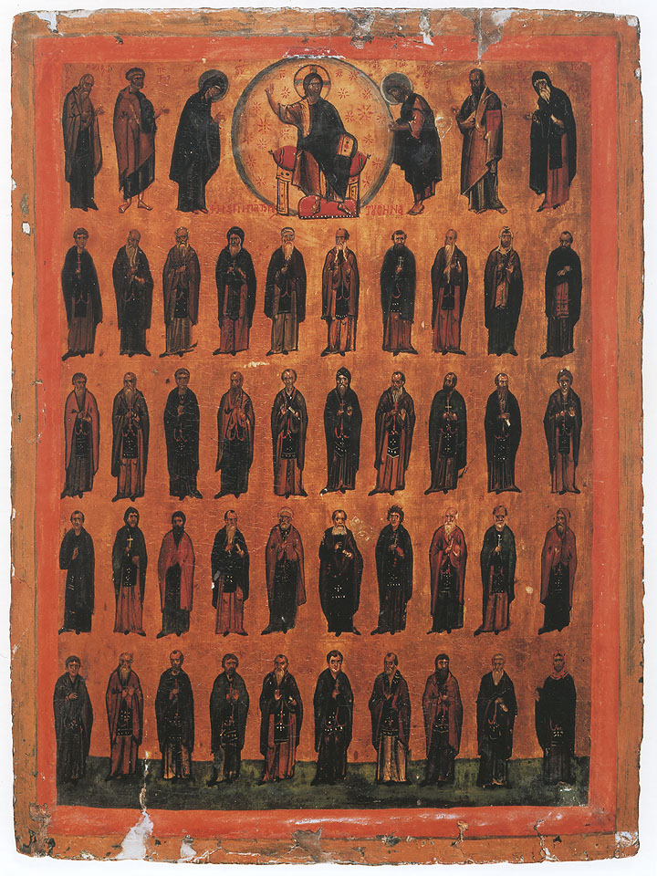 Икона "Святые отцы Синая". Начало XIII века